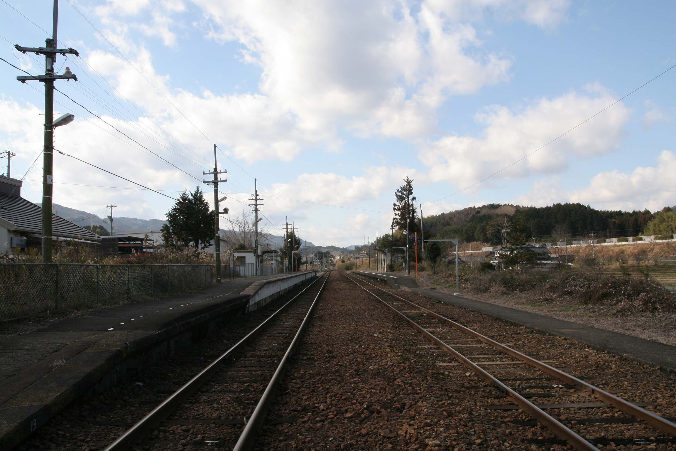 坪井駅の構内